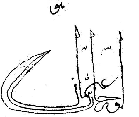 "Orhân bin 'Osmân", 749- 1348 târihli Pambucak-deresi Mülk-nâmesi